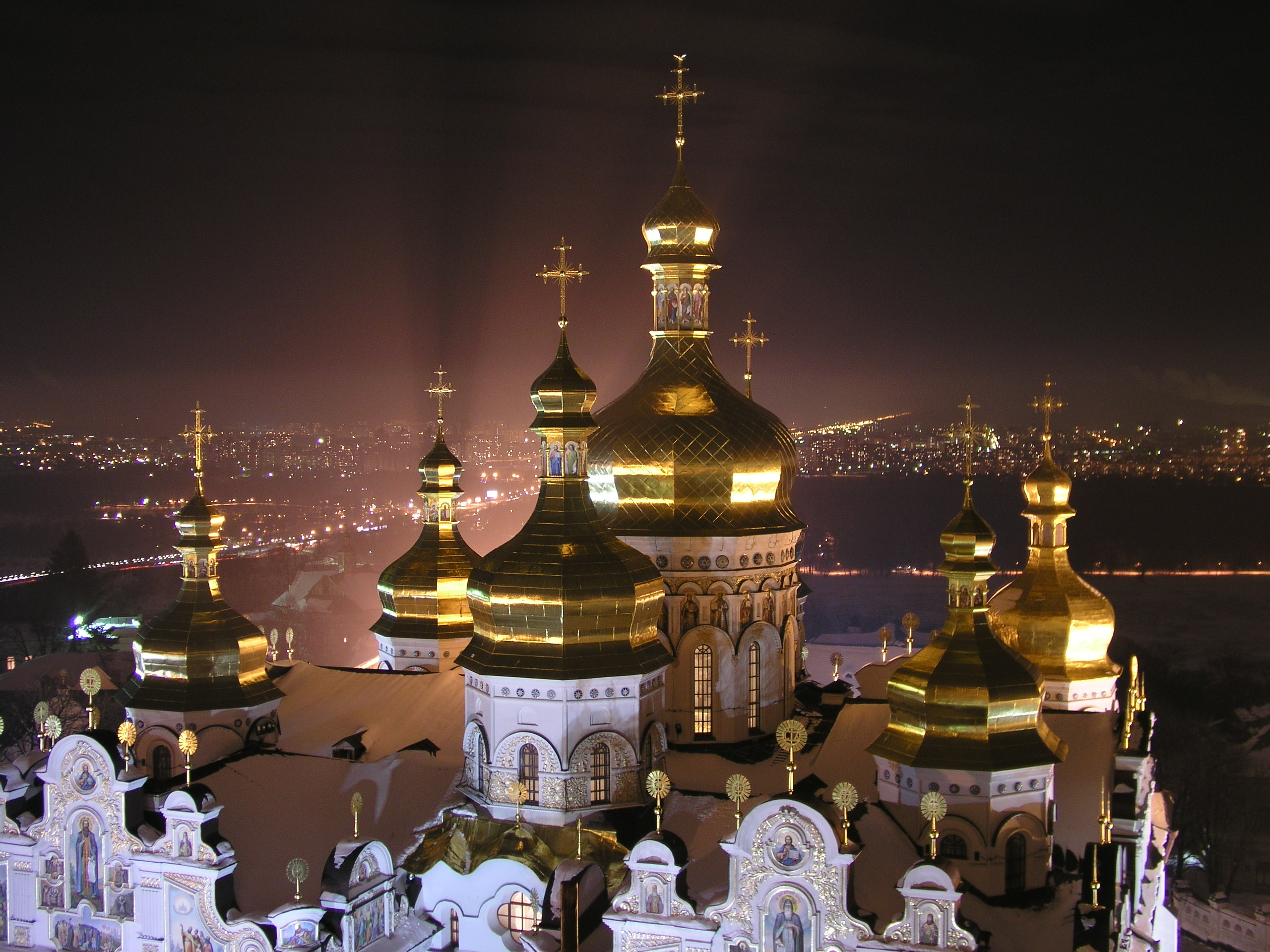 Велика церква Києво-Печерської Лаври (Свято-Успенський собор)